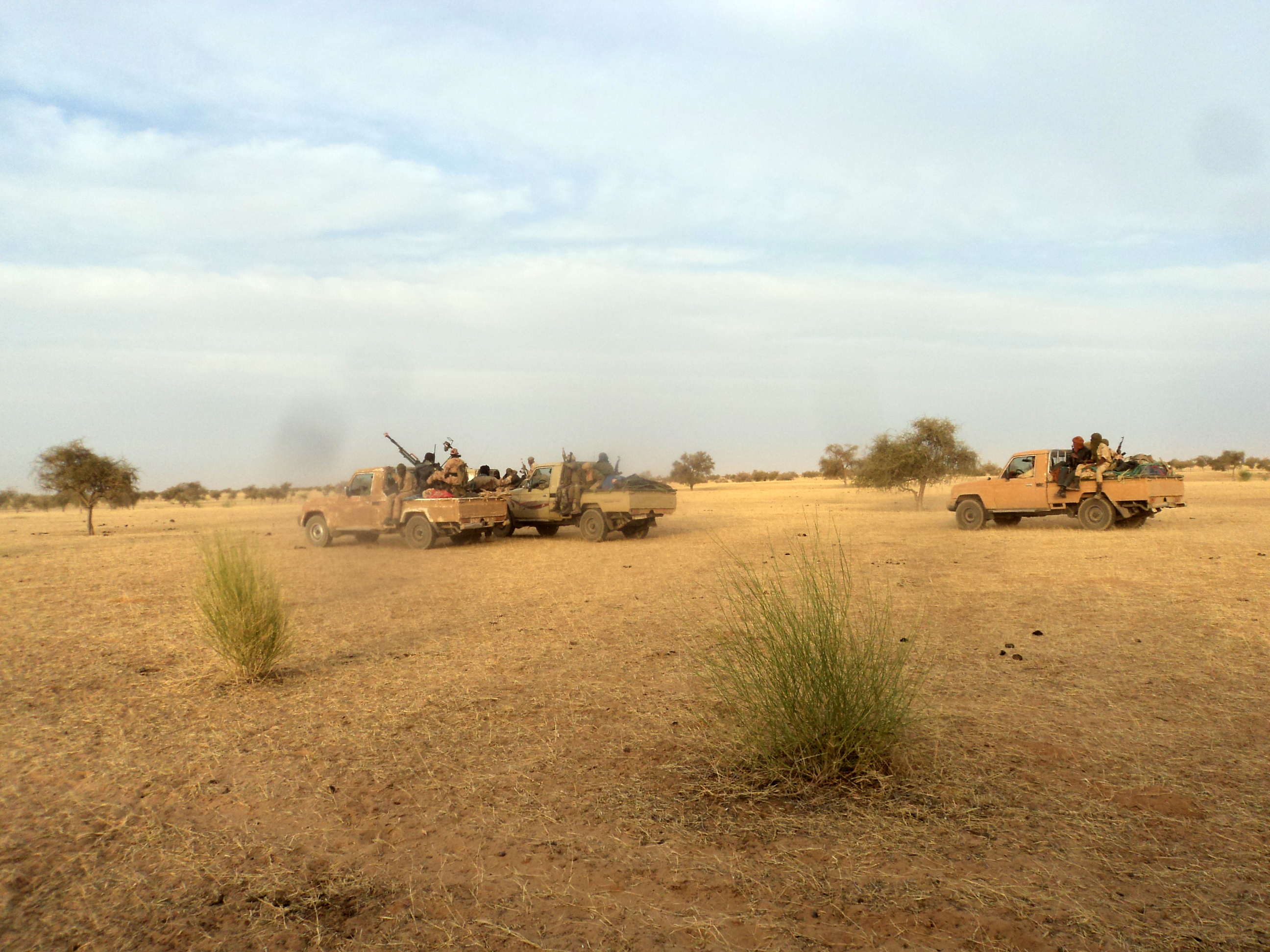 Armed Islamist fighters race near the Mauritania-Mali border on May 21st. مقاتلون إسلاميون مسلحون يتسابقون قرب الحدود الموريتانية-المالية في 21 مايو. Des combattants islamistes armés traversent à vive allure la frontière entre la Mauritanie et le Mali le 21 mai.